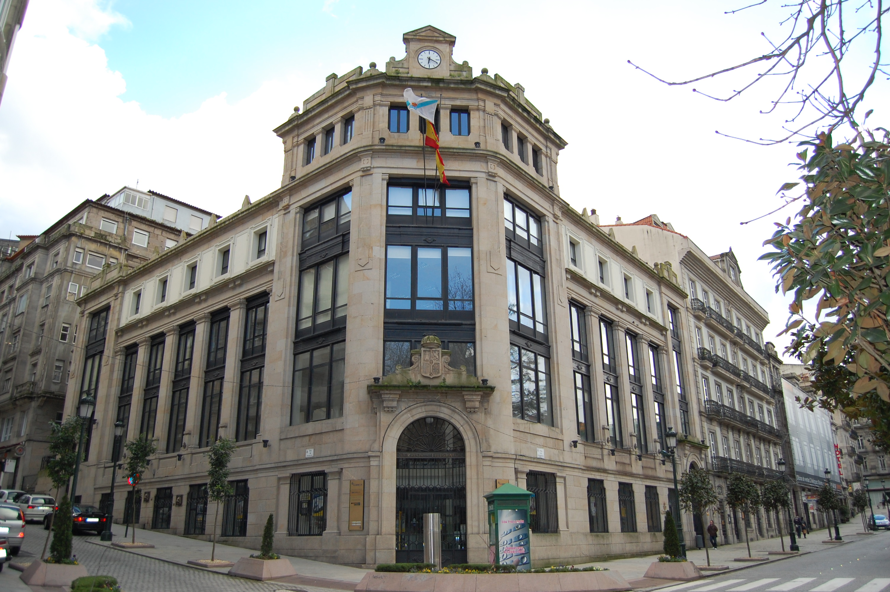 Um ofício postal em Vigo (praça de Compostela).